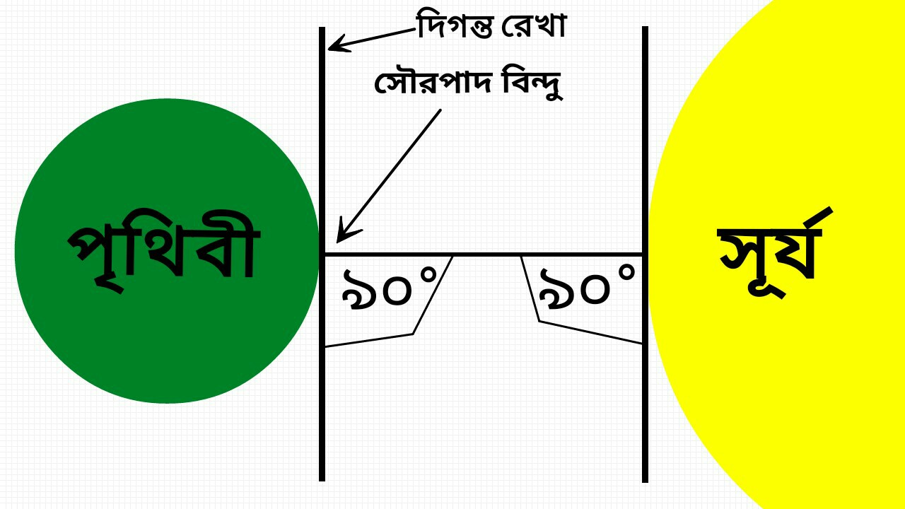 ভূপৃষ্ঠের যে বিন্দুটি সূর্যের ঠিক নিচে অবস্থান করে সেটাই সৌরপাদ বিন্দু। কোন জ্যোতির্বৈজ্ঞানিক বস্তুর সৌরপাদ বিন্দু থেকে সূর্যের দূরত্ব হল ঐ জ্যোতির্বৈজ্ঞানিক বস্তু থেকে সূর্যের সর্বাপেক্ষা নিকটতম দূরত্ব।